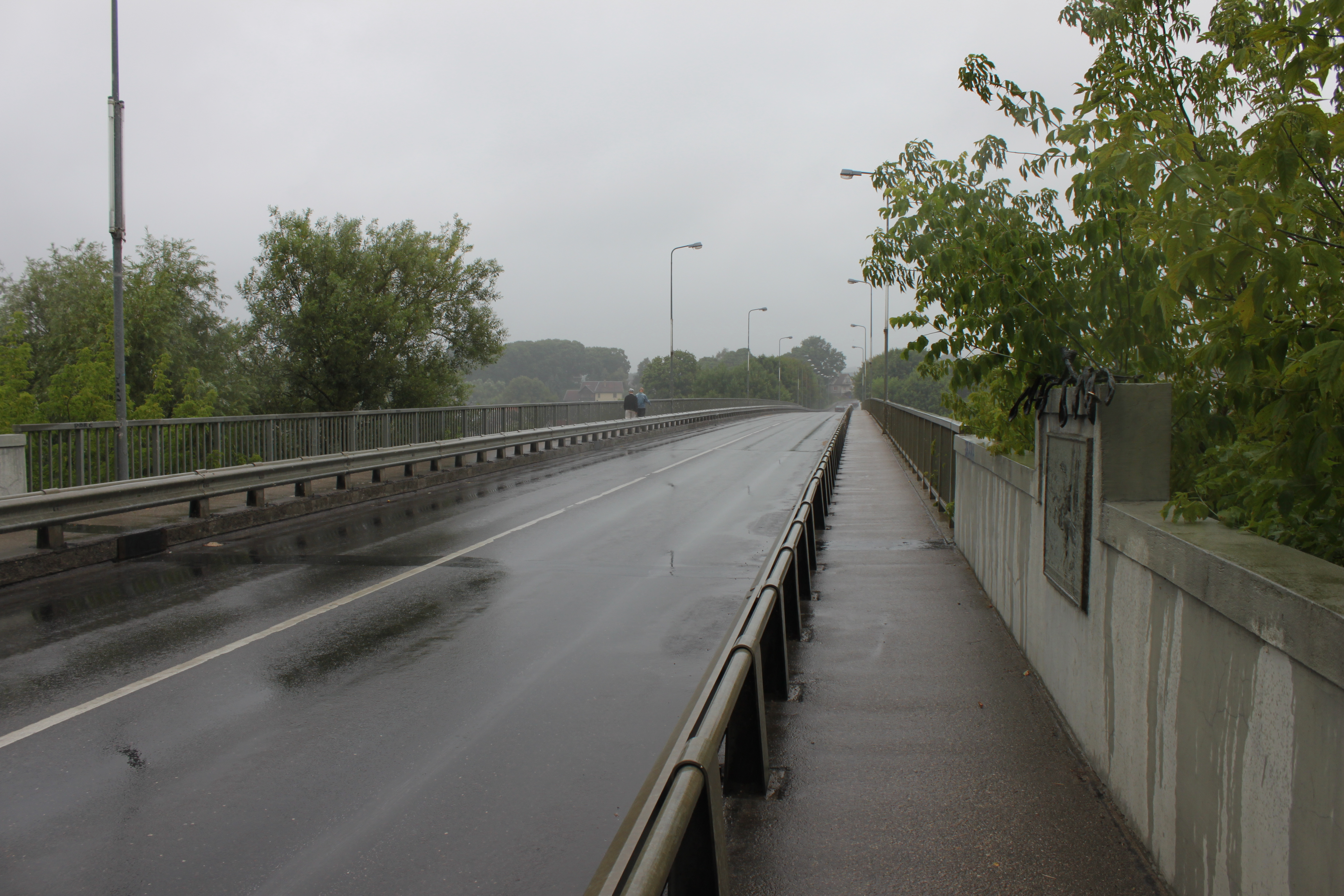 A. Juozapavičiaus tiltas per Nemuną Alytuje